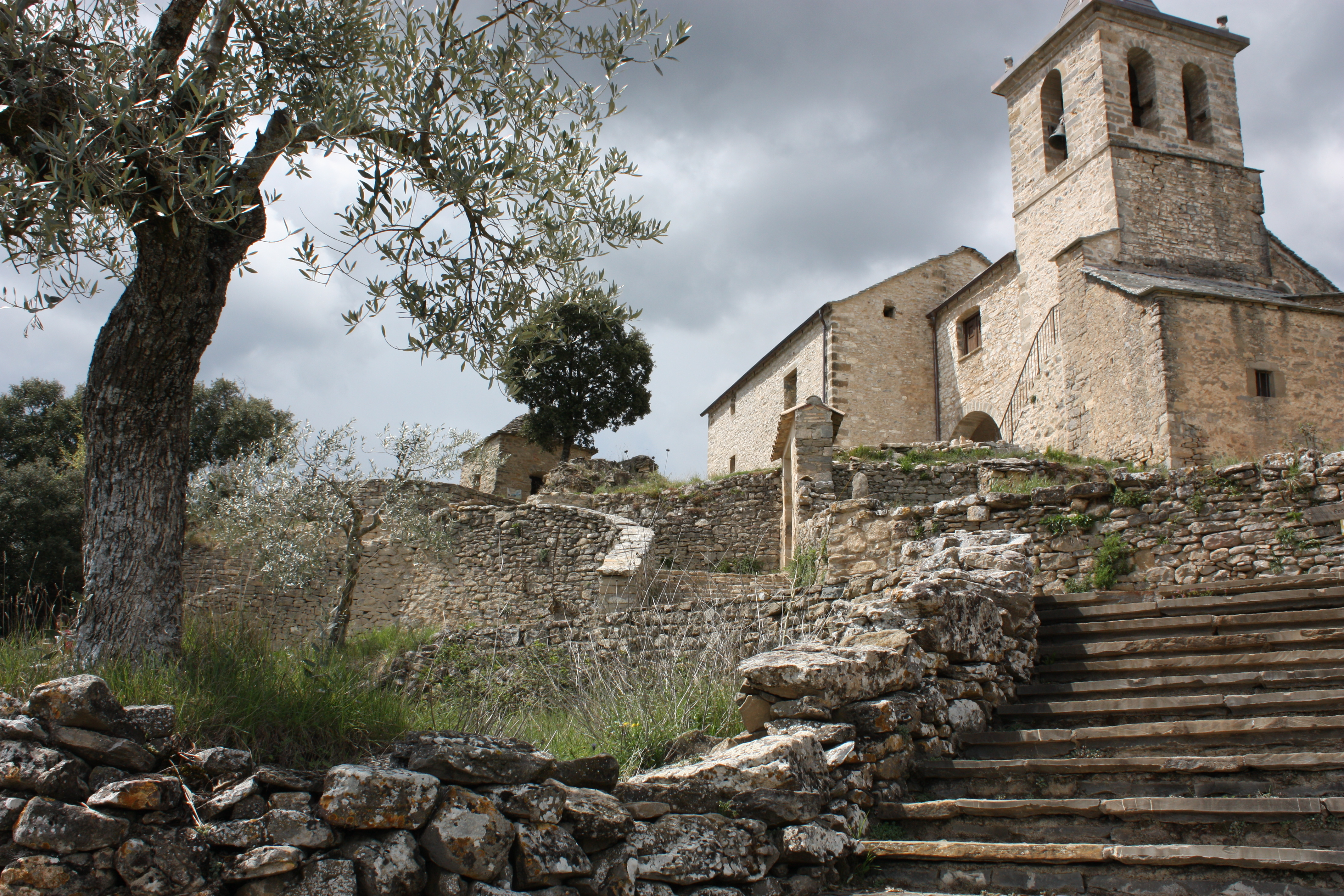 Iglesia de San Estebán de Almazorre junto a esconjuradero.